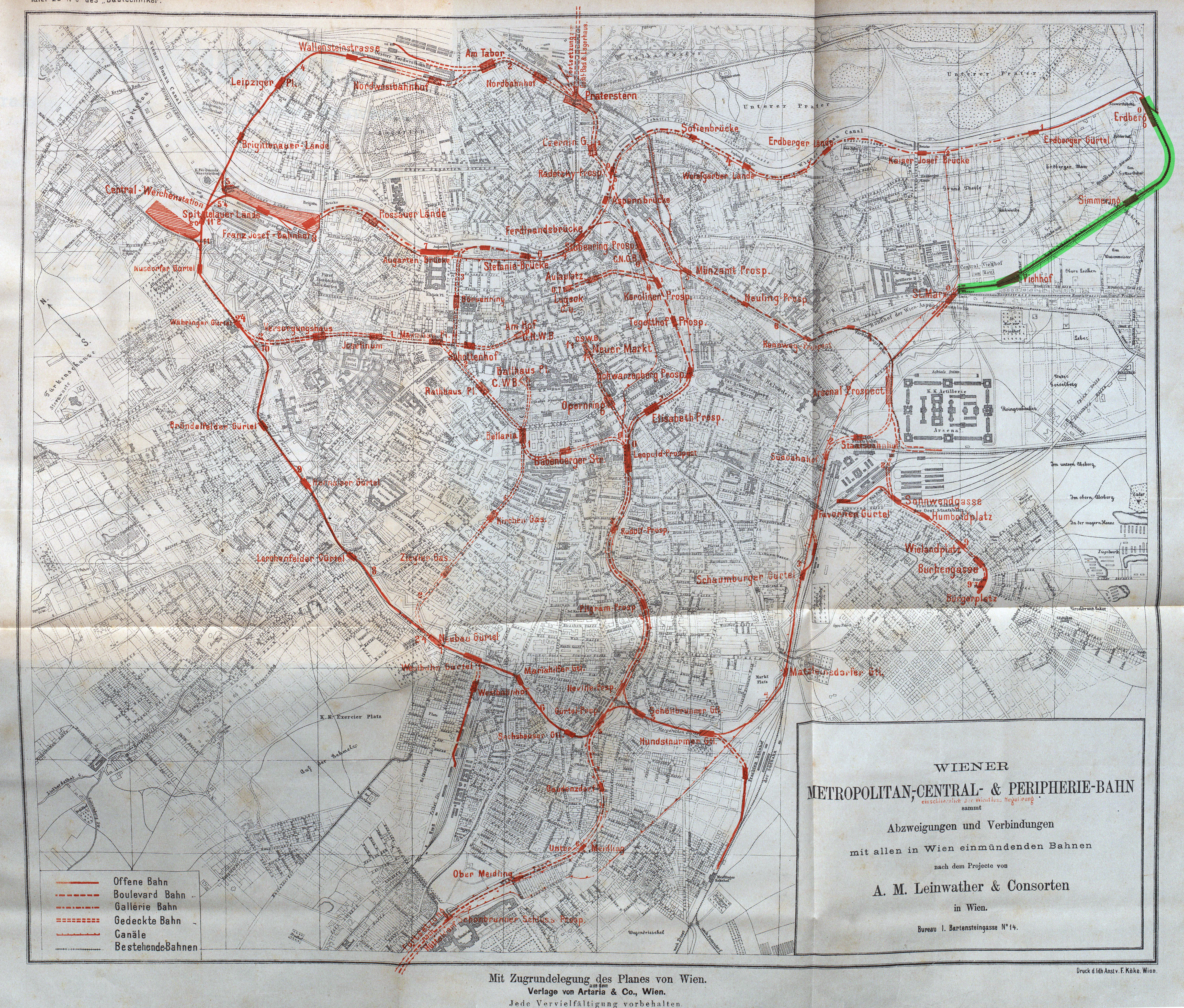 Wien, Projekt Metropolitanbahn, darin: Schlachthausbahn